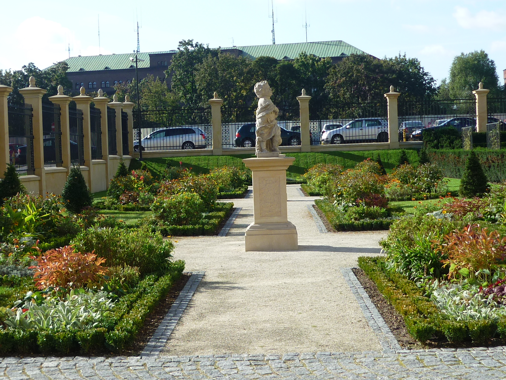 Ogród Barokowy przy Muzeum Miejskim Wrocławia